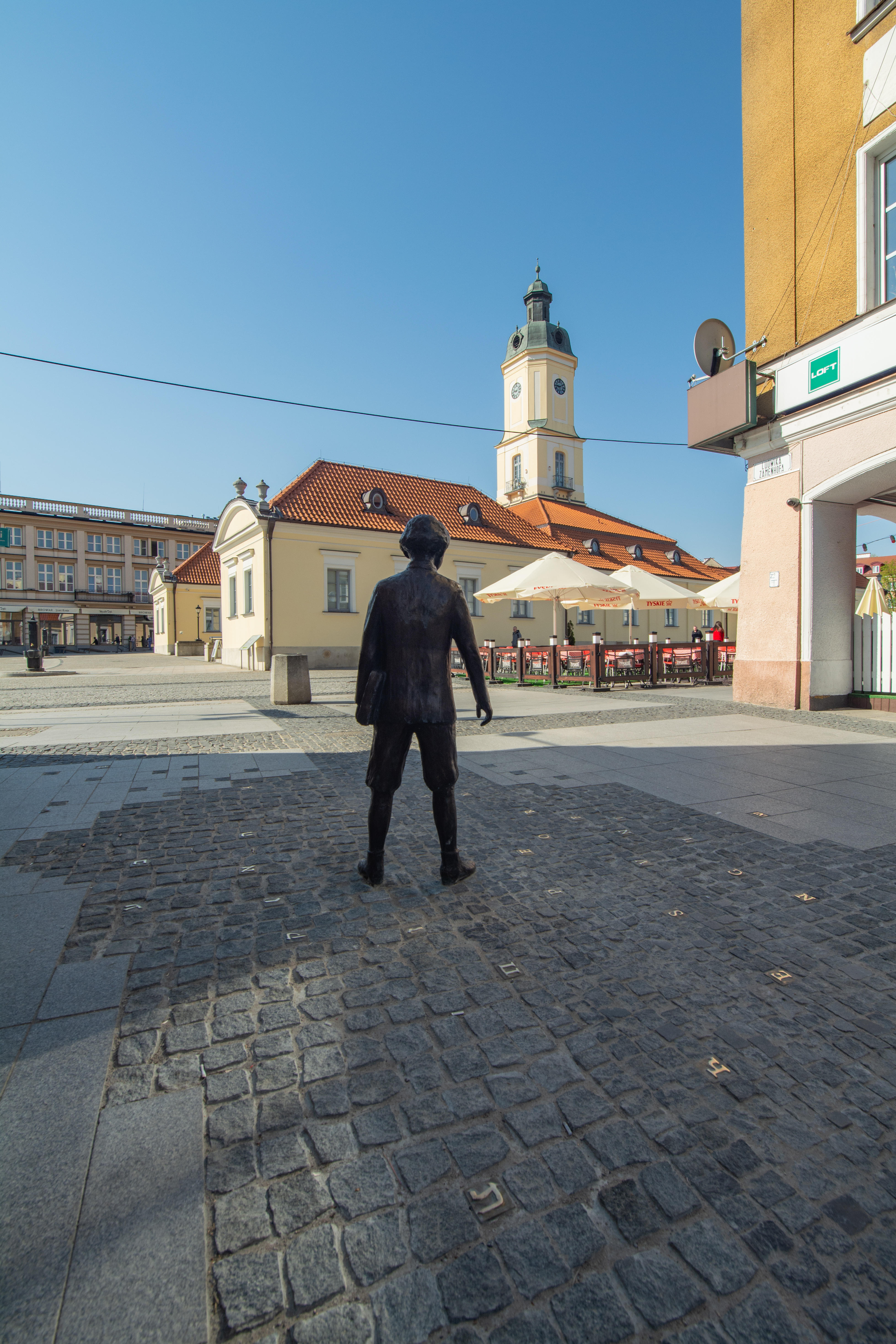 Monumento al juna L. L. Zamenhof en Bjalistoko. Vido al la urbodomo.